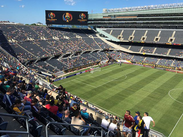 Venezuela-Jamaica Copa América Centenario 2016. Soldier Field, Chicago.